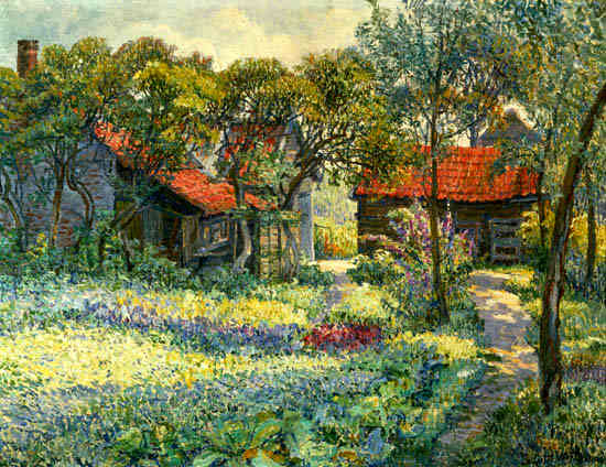 Juliette Wytsman: De Geméisgaart